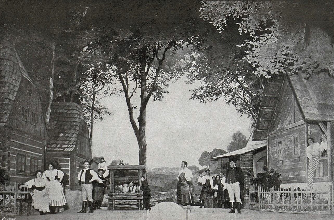 Karel Šebor: Zmařená svatba (Vinohradské divadlo 1914)